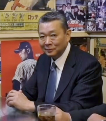 高木豊のYouTube動画に出演する江川卓